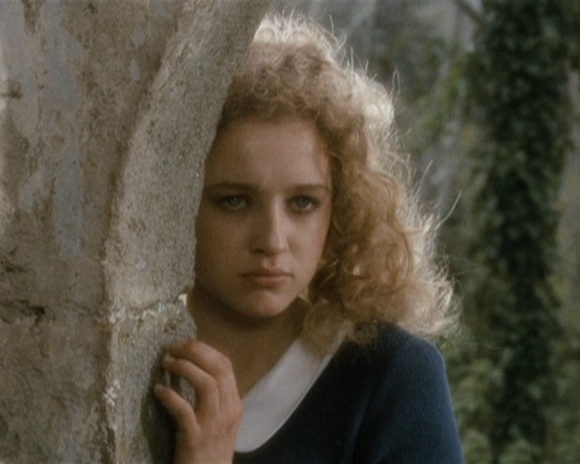 Eleonora Giorgi in a scene of the film Alla mia cara mamma nel giorno del suo compleanno